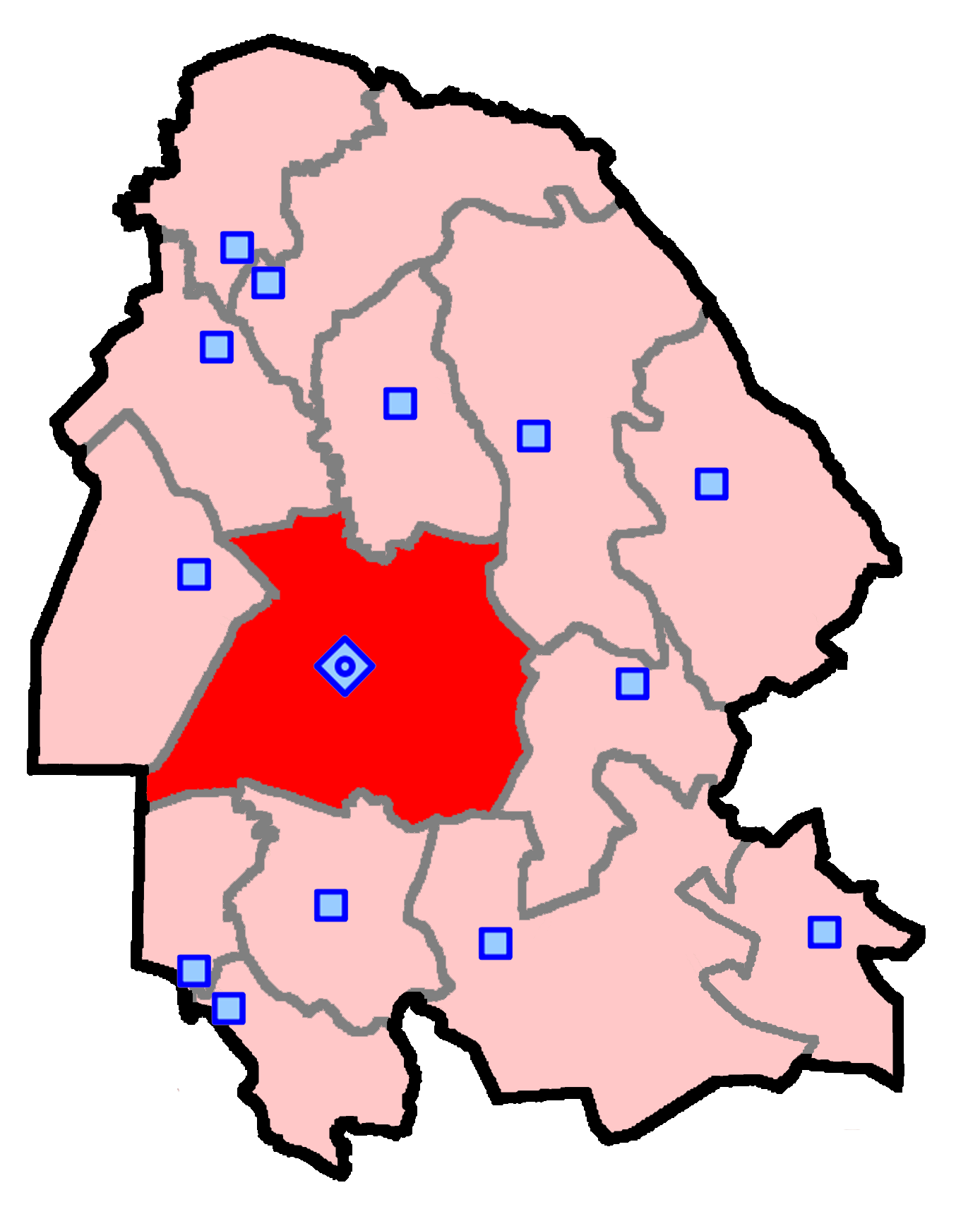 حوزهٔ انتخاباتی اهواز برای انتخابات مجلس شورای اسلامی